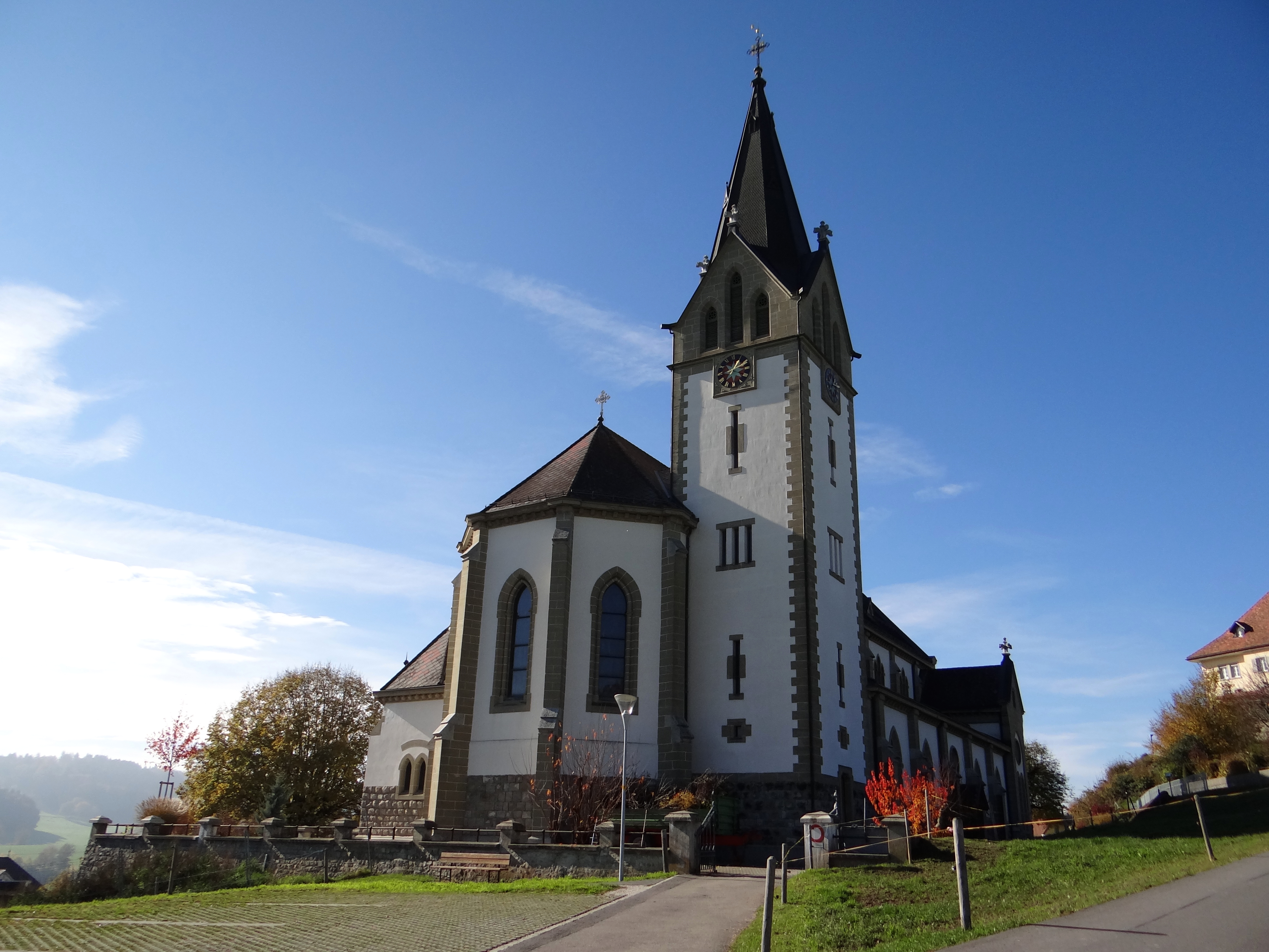 Pfarrkirche Sankt Michael in Heitenried im Kanton Freiburg (Schweiz)